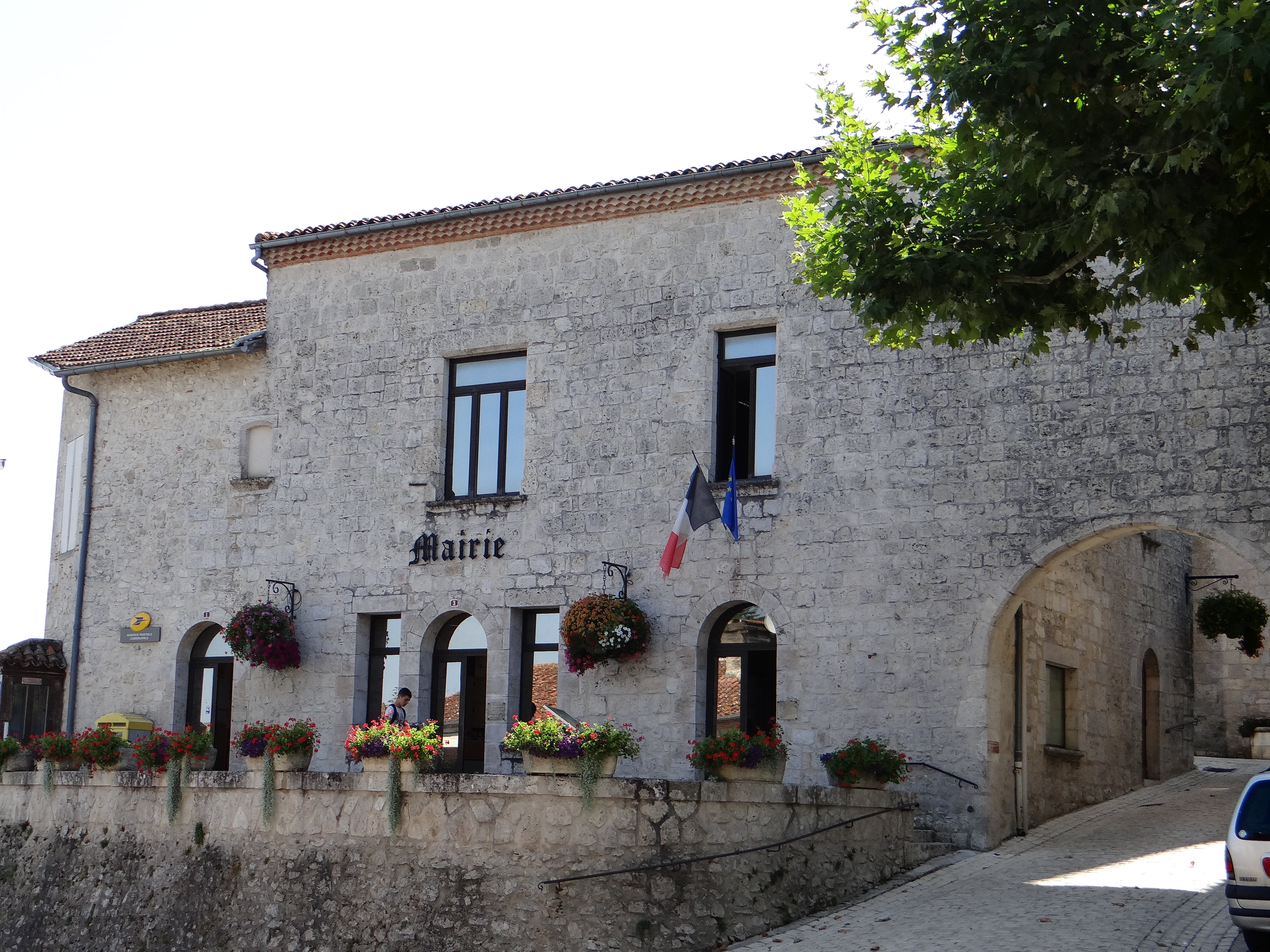 Sainte-Colombe-en-Bruilhois - La mairie